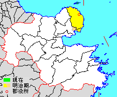 大分県西国東郡の位置